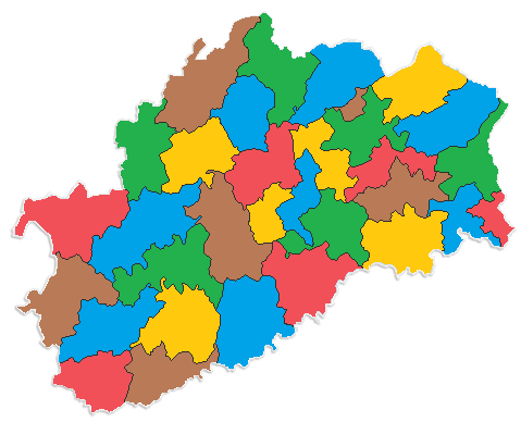 Les 32 Cantons de la Haute-Saône avant le redécoupage cantonal